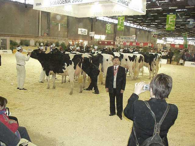 SIMAGENA Tierprämierung 2005, Paris, Frankreich